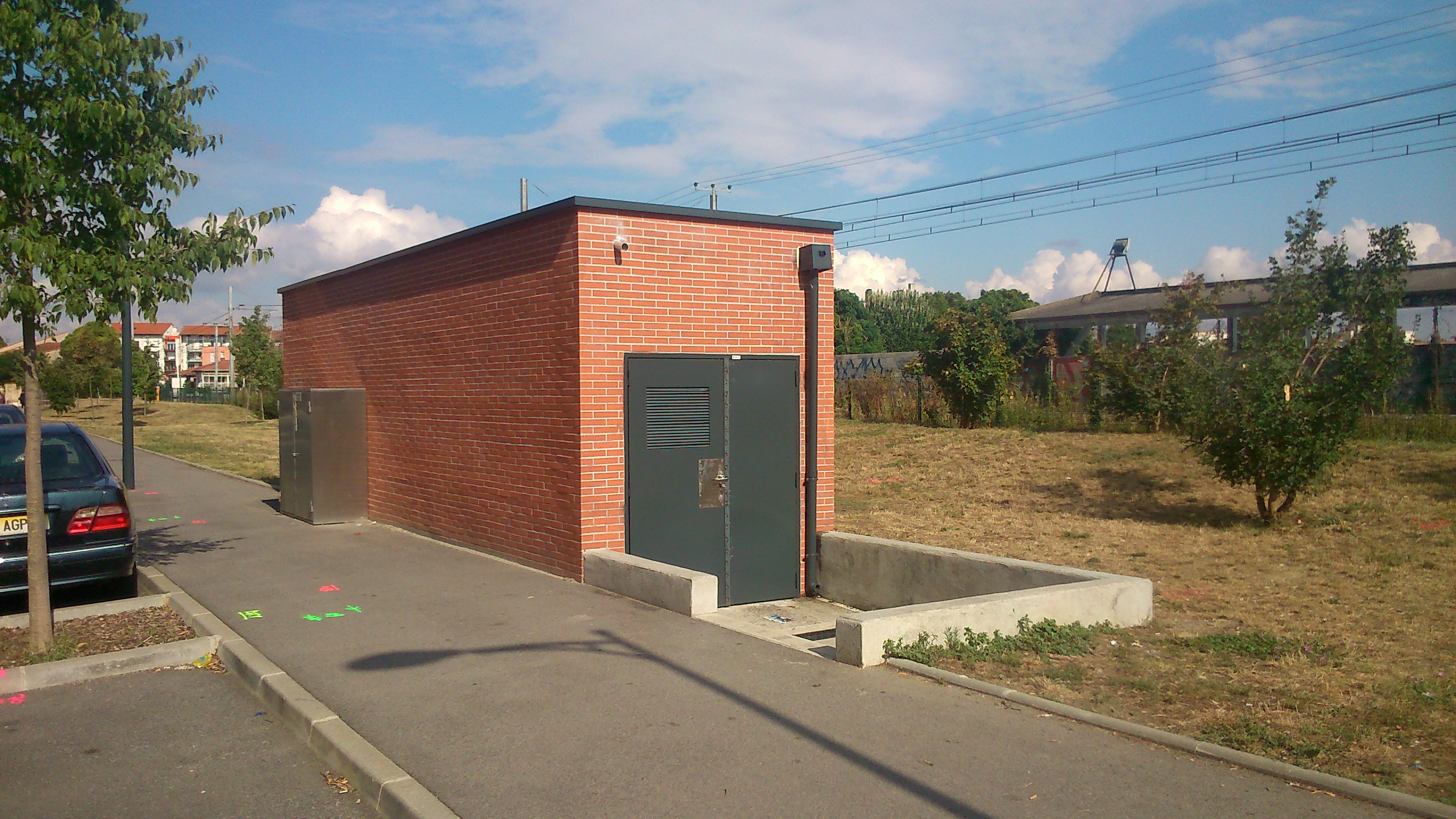 Accès à la station fantôme Niel, de la ligne B du métro de Toulouse